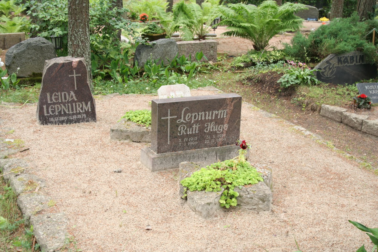 Hugo Lepnurme haud Pärnamäe kalmistul.